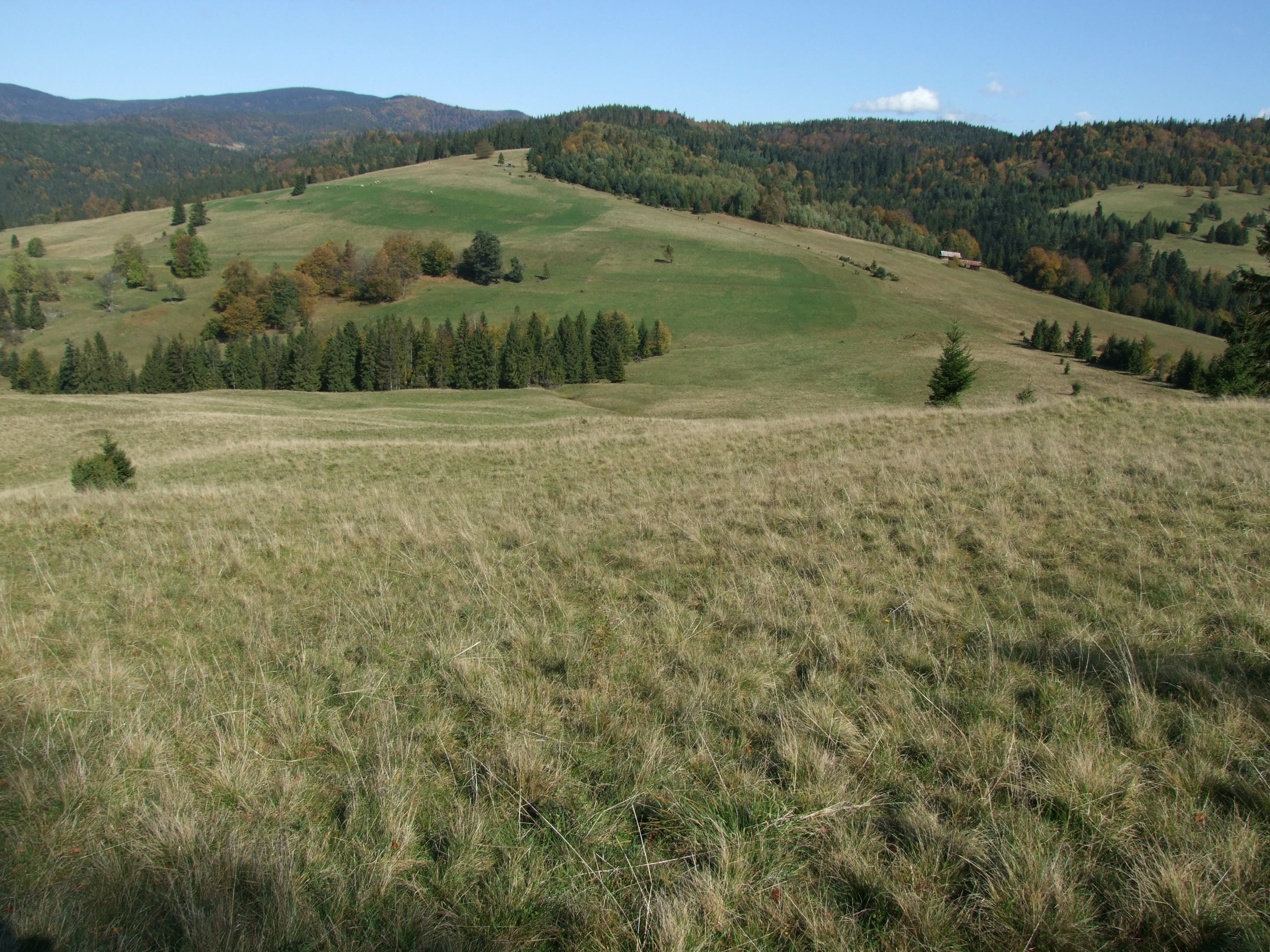 Przełęcz Rozdziela (Małe Pieniny)